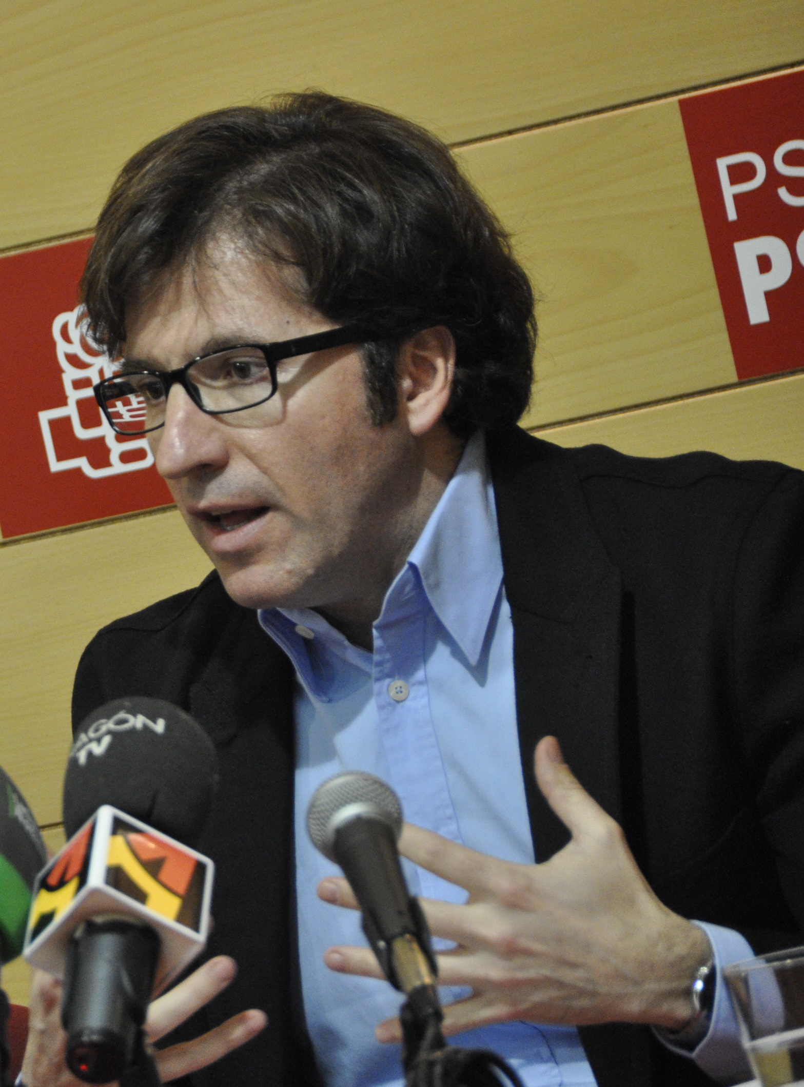 Los diputados María González y Juan Moscoso, portavoces del candidato a Secretario General del PSOE, Alfredo Pérez Rubalcaba, presentaron el documento “38 propuestas…y más” para lograr un PSOE fuerte, más abierto y participativo, de cara al 38 Congreso del PSOE que se celebrará en febrero.